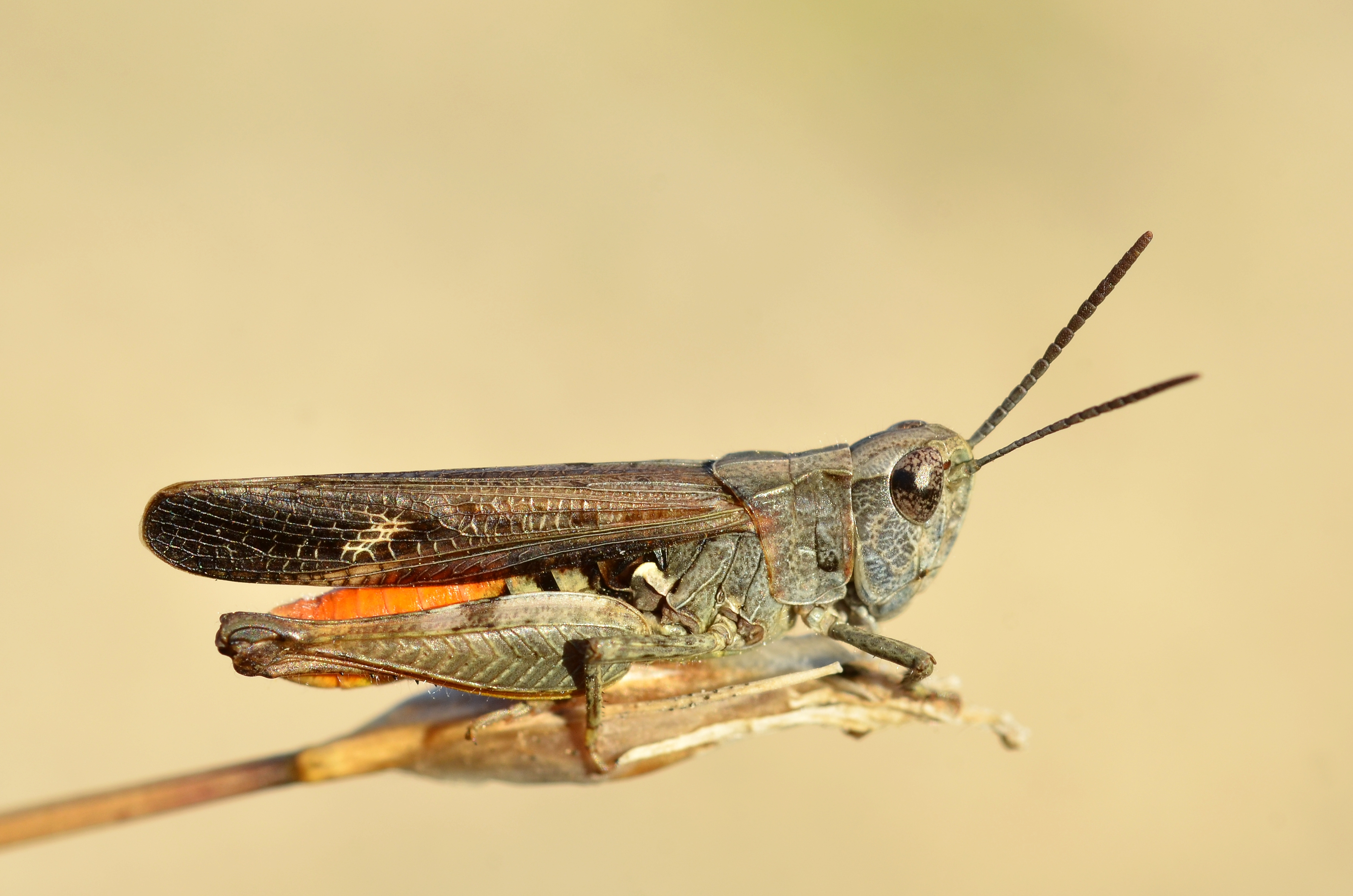 Omocestus raymondi male